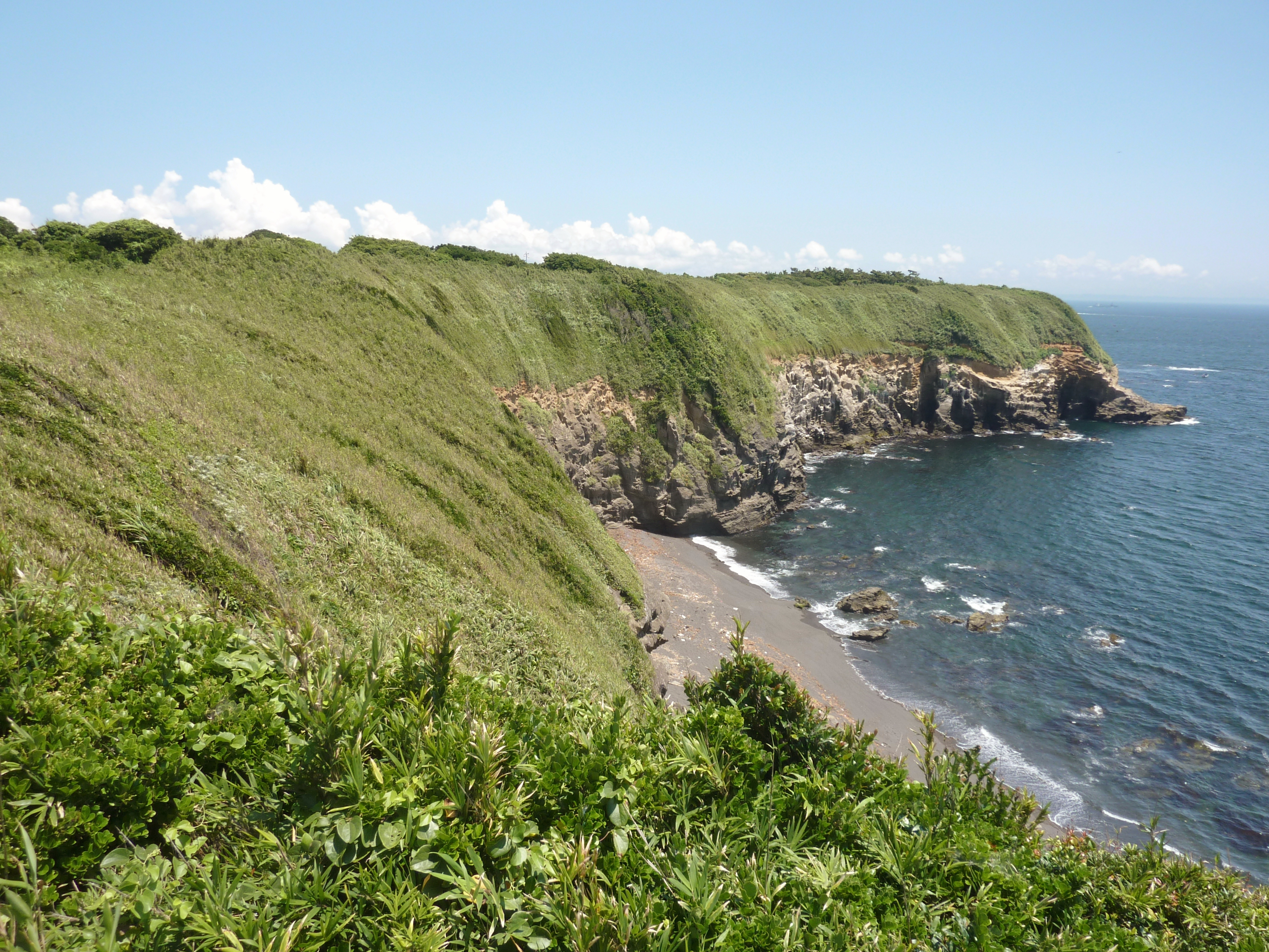 城ヶ島公園のウミウ展望台からウミウ生息地と赤羽根海岸を望む（神奈川県三浦市）